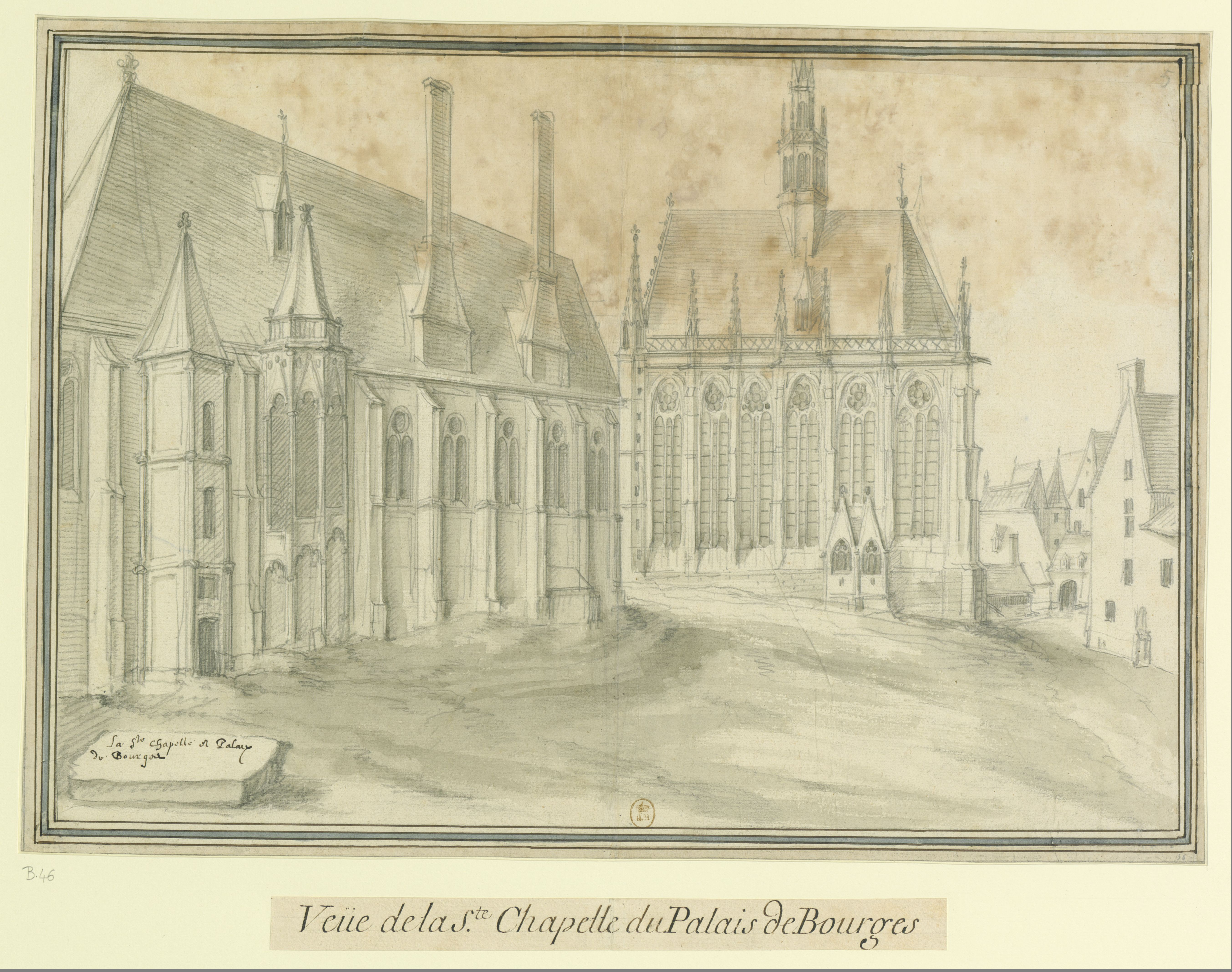 Vue de la Sainte-Chapelle du palais de Bourges ; Dessin à la mine de plomb, lavis d'encre de Chine ; dimensions : 28,2 x 41,3 cm (filet intérieur) ; publié en 1621.